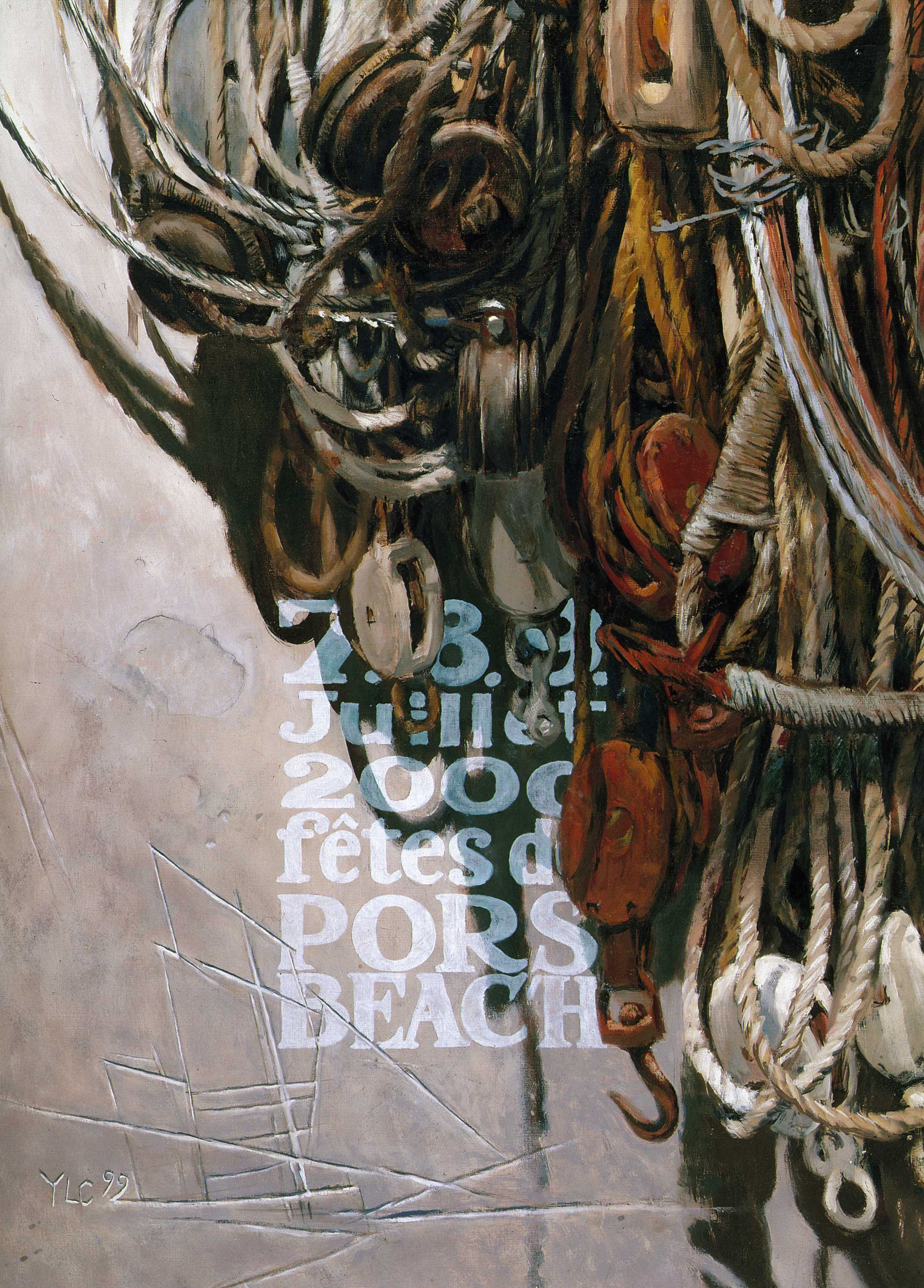 Affiche_PB2000.jpg